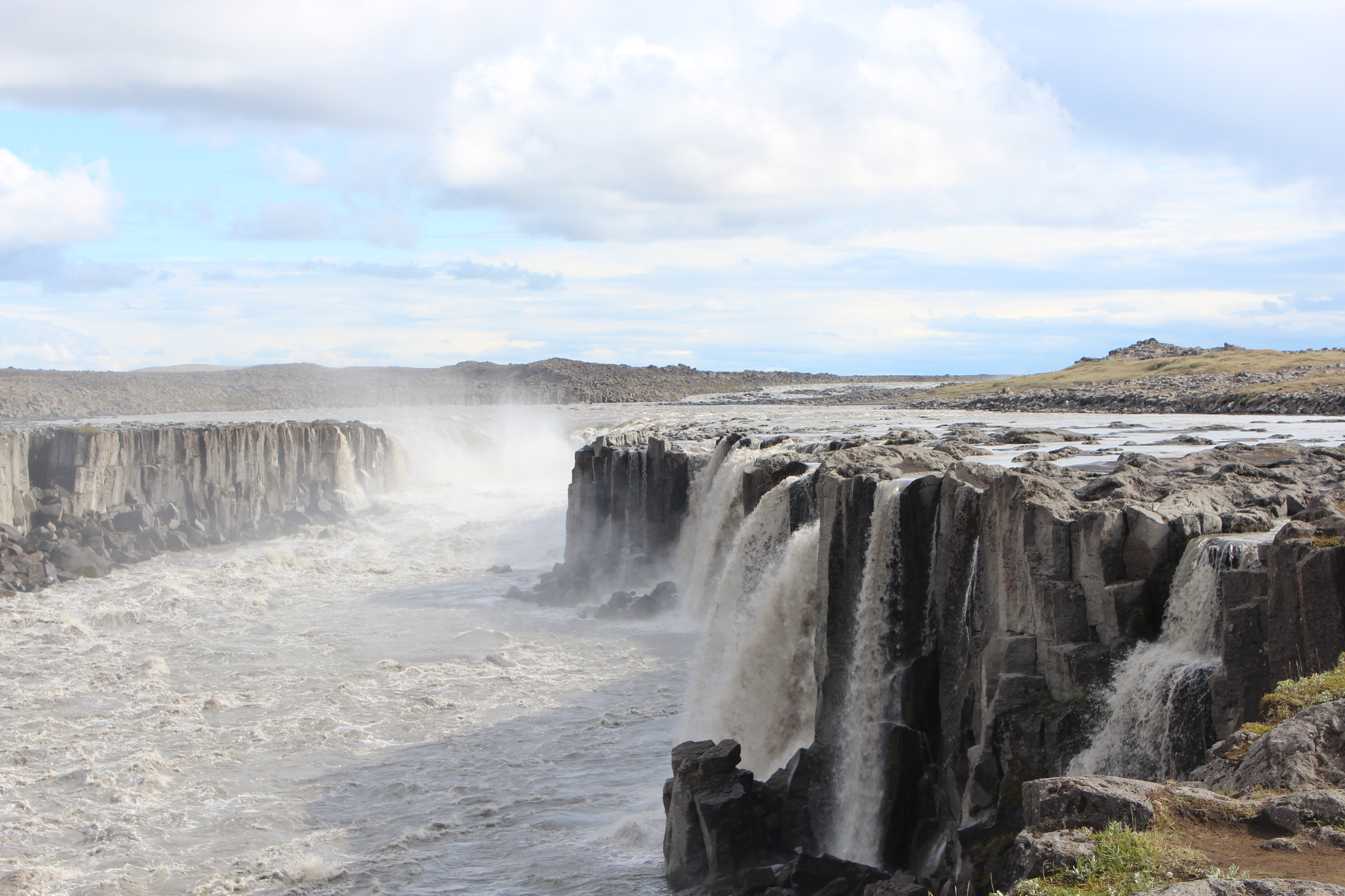 De Selfoss Waasserfall bei Selfoss, an Island